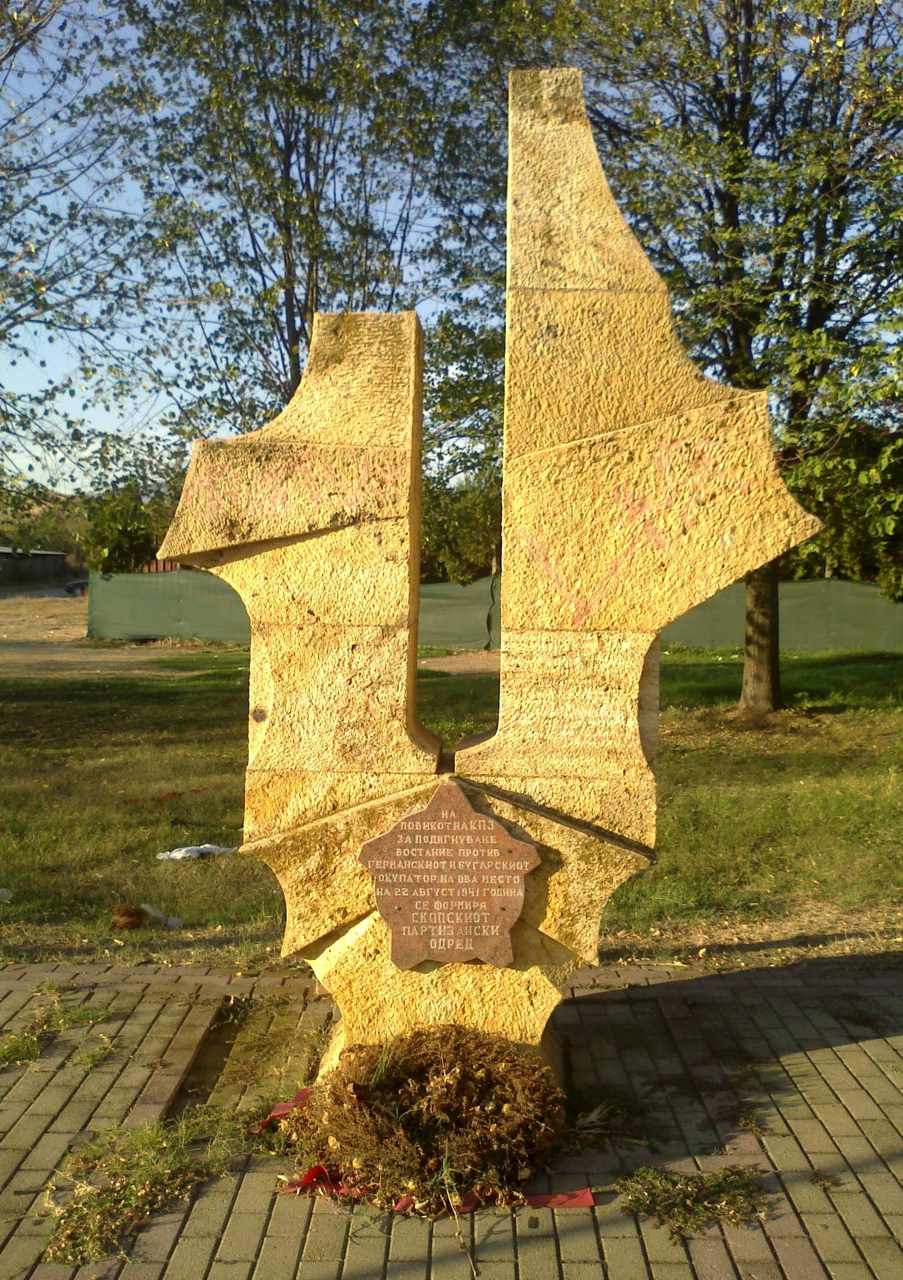 Споменик на местото каде е формиран Првиот скопски партизански одред